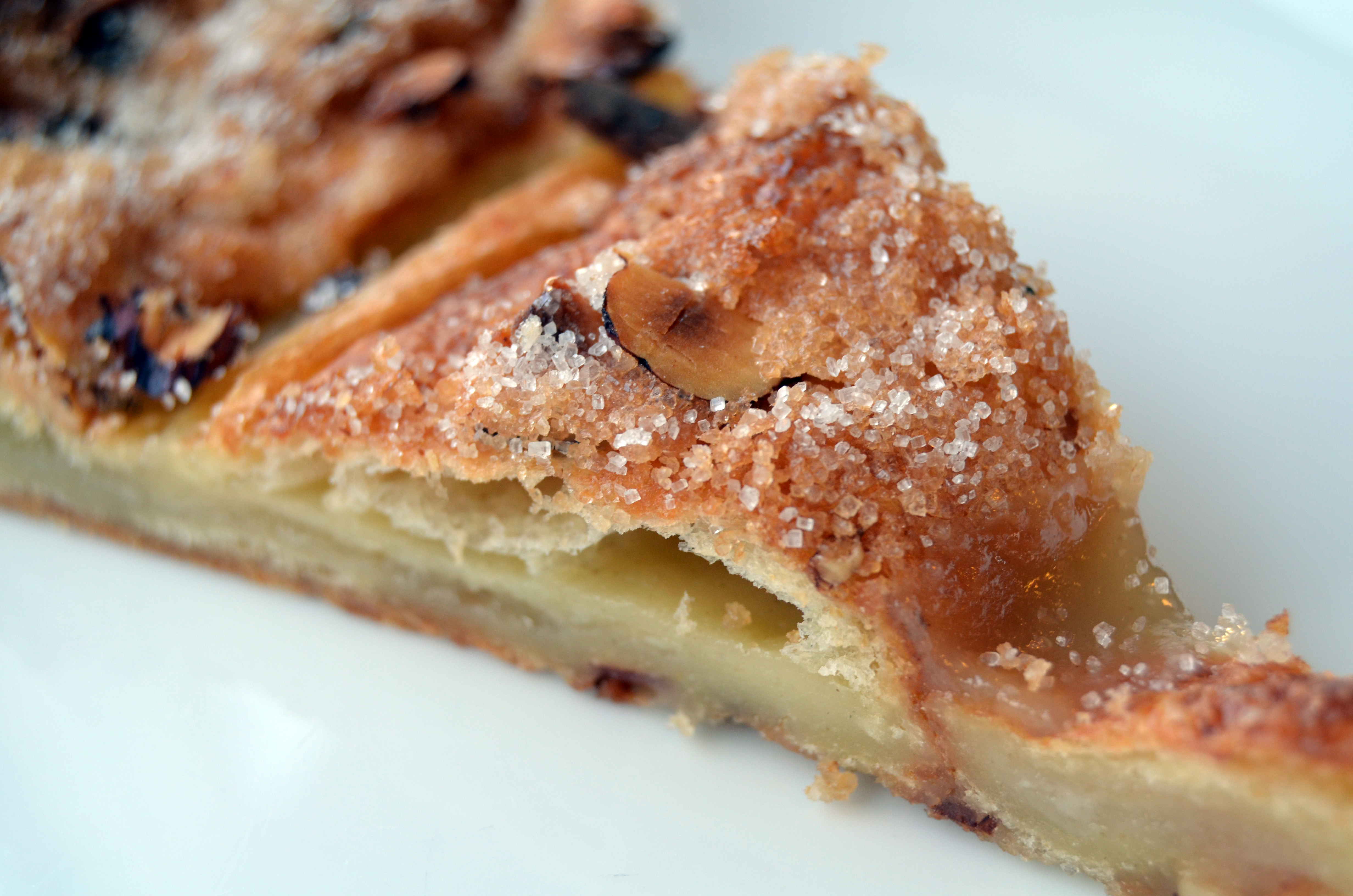 Kringle